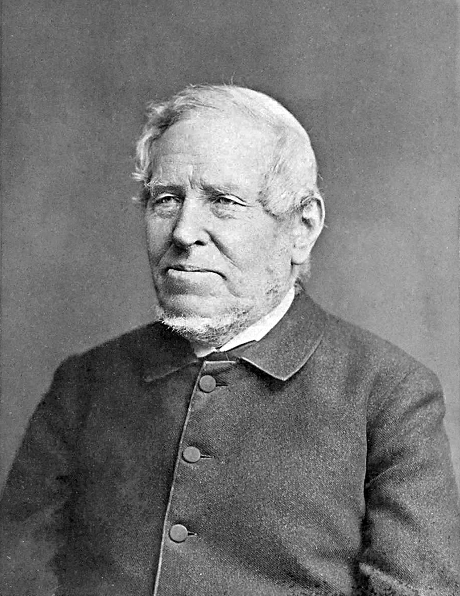 Samuel Francis Smith